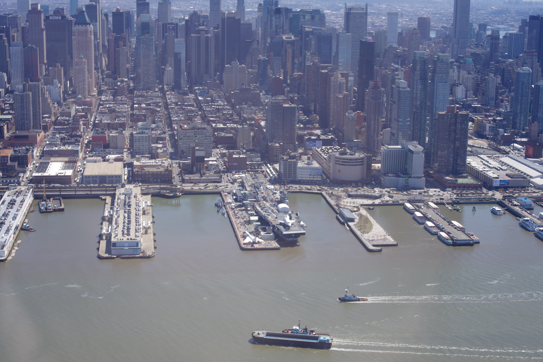 Intrepid Museum